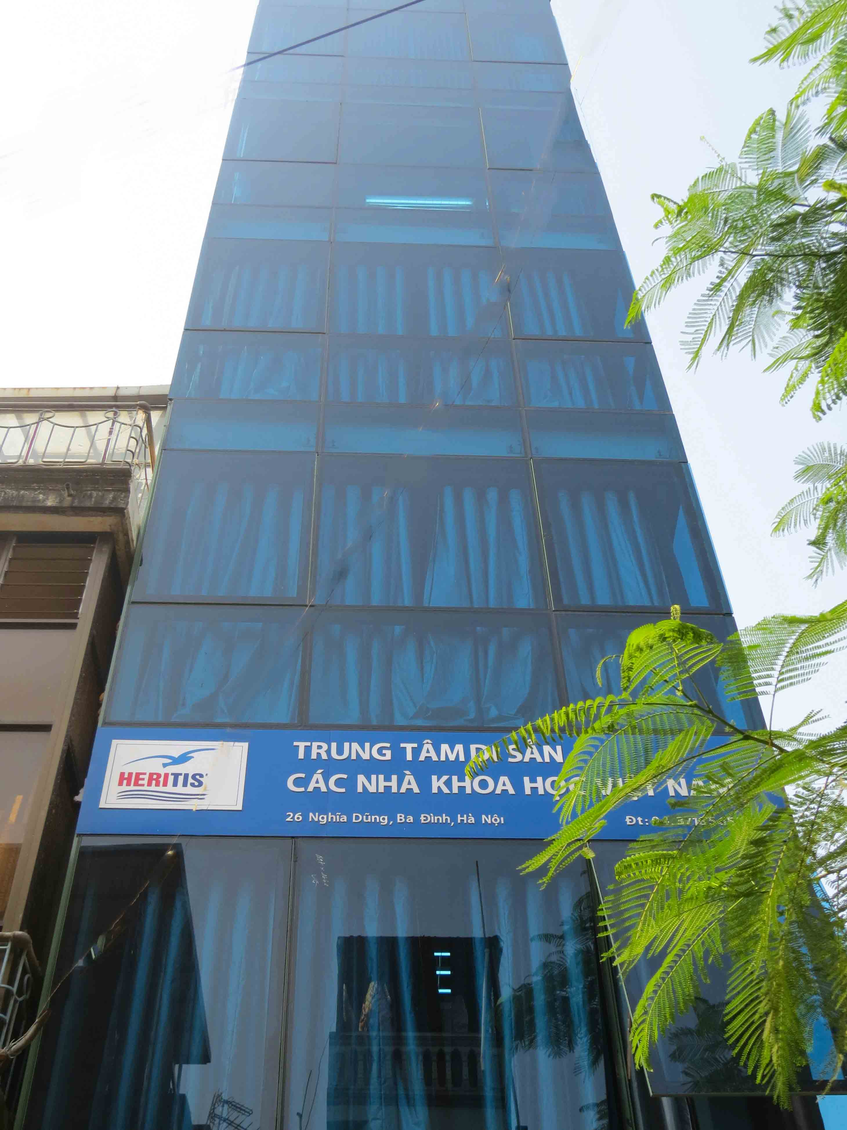 trung tâm di sản các nhà khoa học việt nam